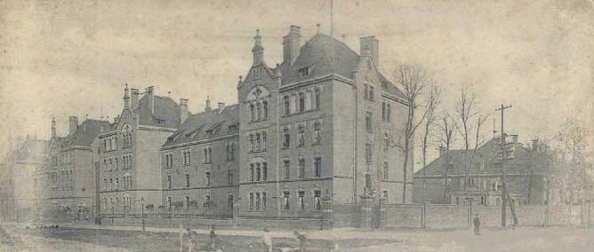 Falckenstein Kaserne vor der Zerstörung 1944